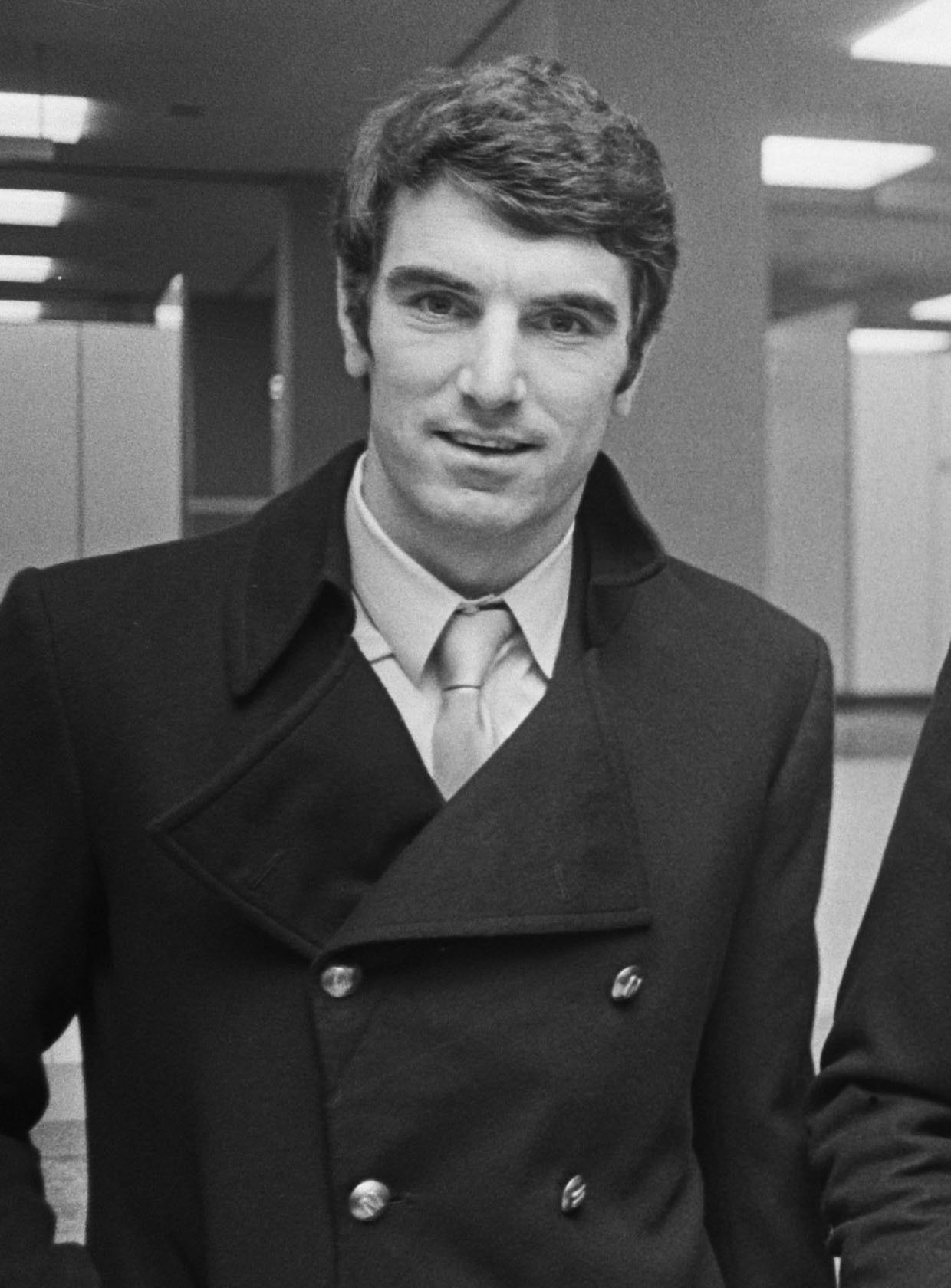 Voetbalelftal van Napoli arriveert op Schiphol voor de wedstrijd tegen Ajax. Doelman Dino Zoff.